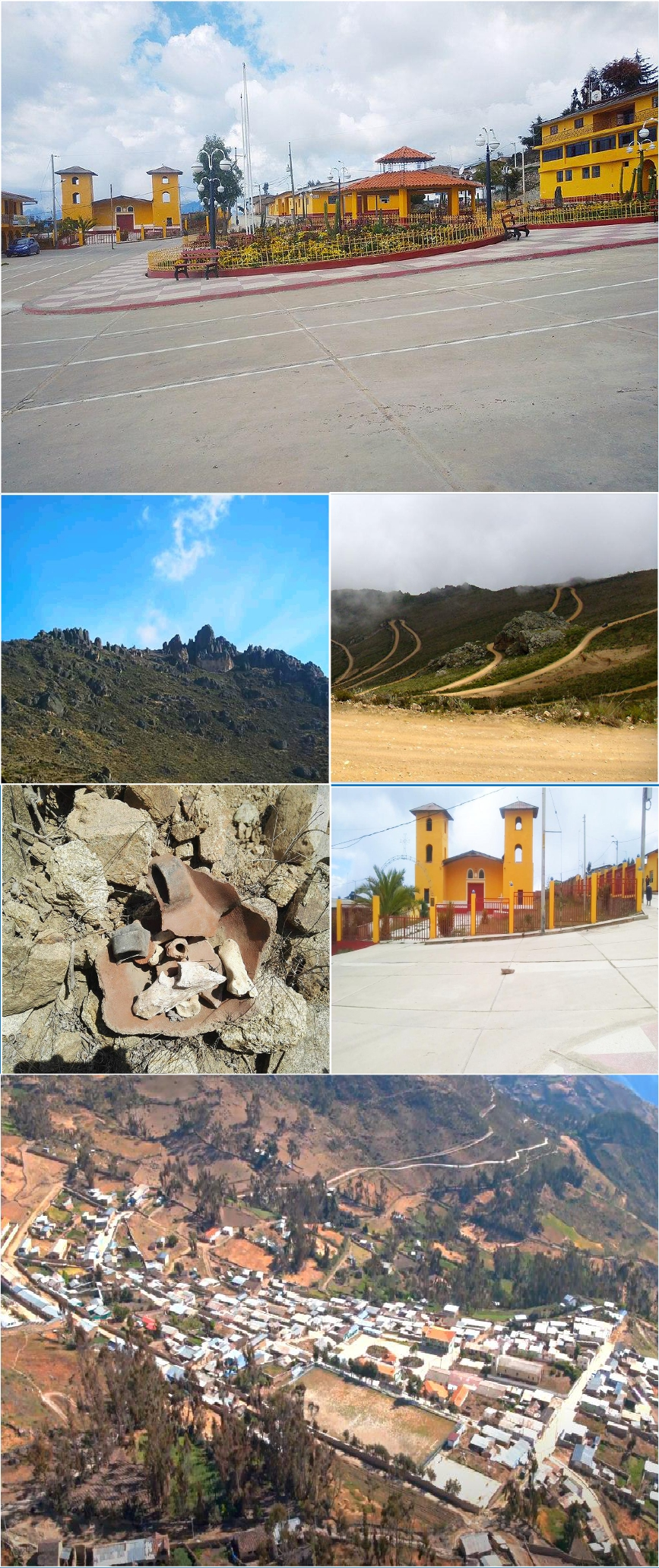 Imágenes de Pampas Grande